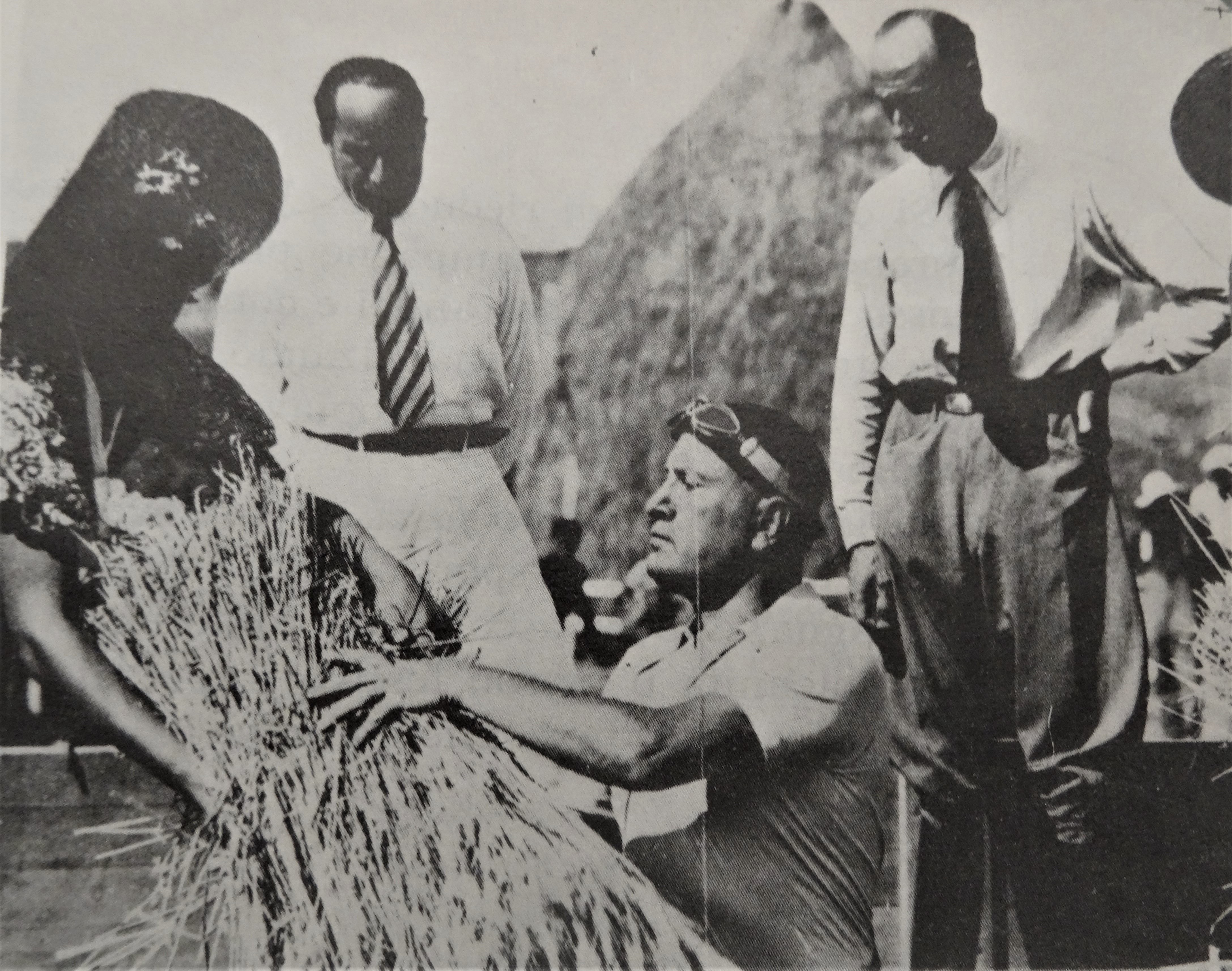 Fotografia che ritrae Benito Mussolini al lavoro nei campi, impegnato nella campagna di promozione della coltivazione del grano, finalizzata all'autosufficienza produttiva di frumento dell'Italia.